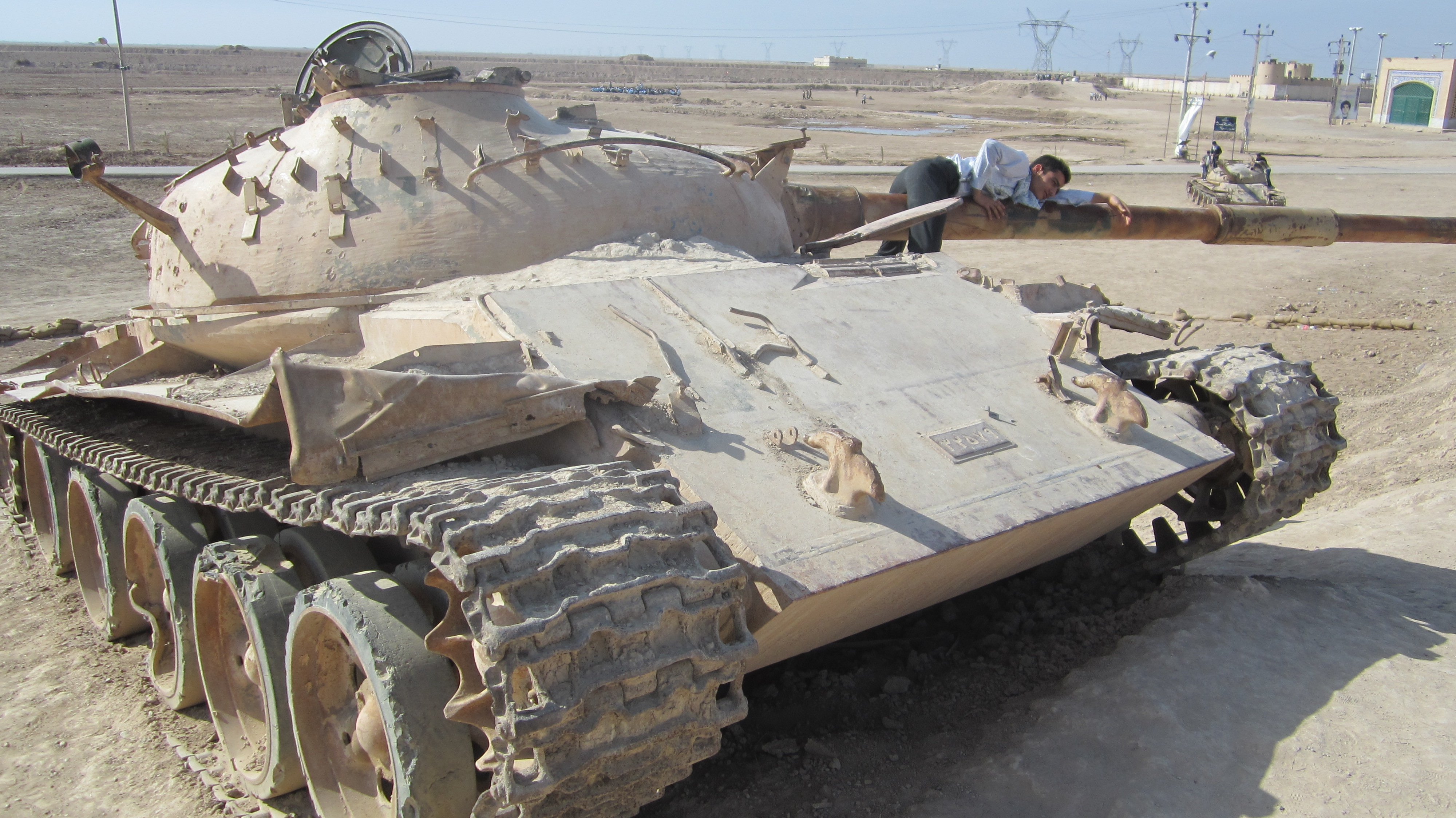 تانک ایرانی در راهیان نور که بازیچه گردشگران دانش‌آموز شده